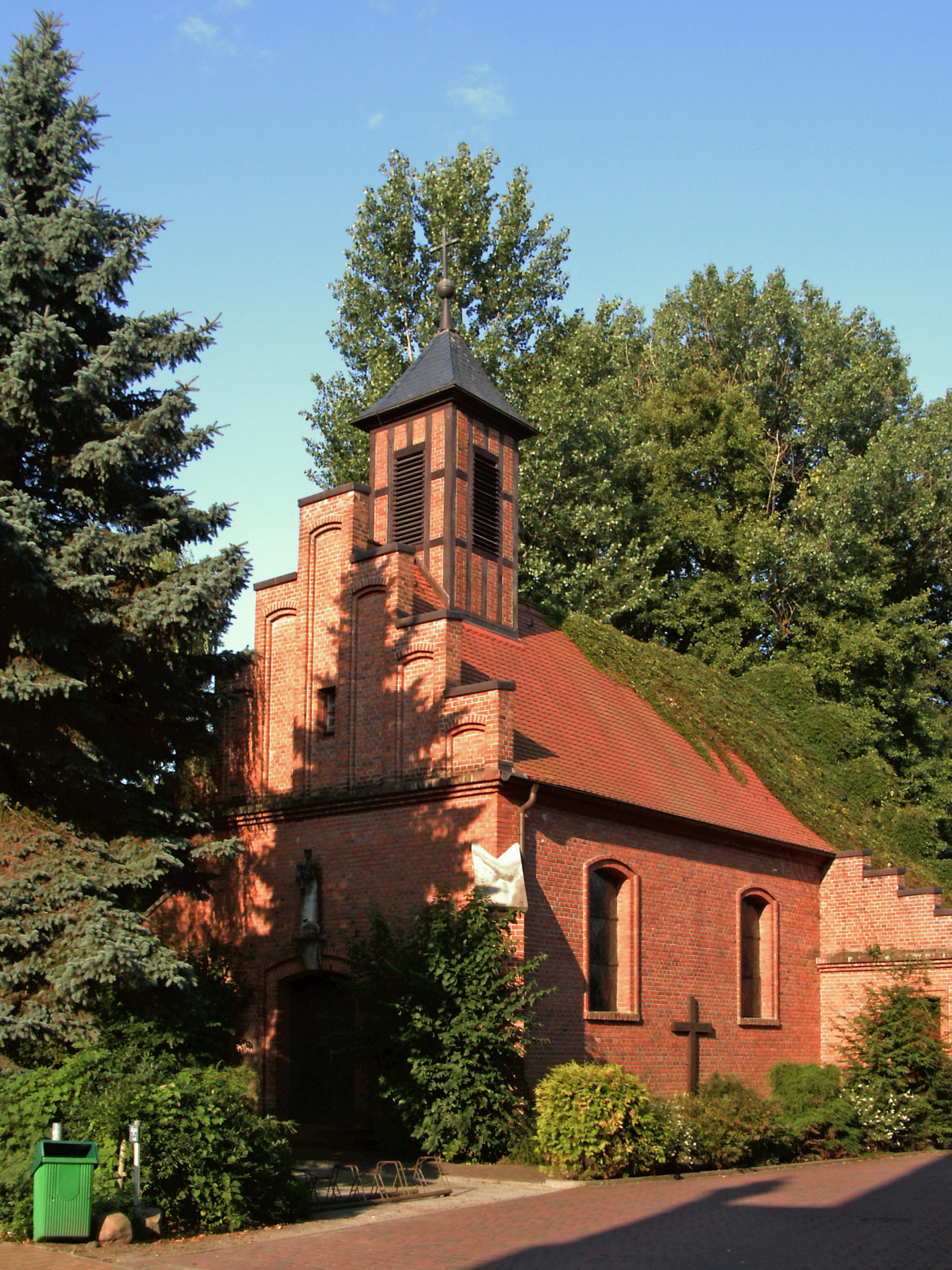 Katholische Kirche Maria Himmelfahrt in Beetzendorf, Altmarkkreis Salzwedel